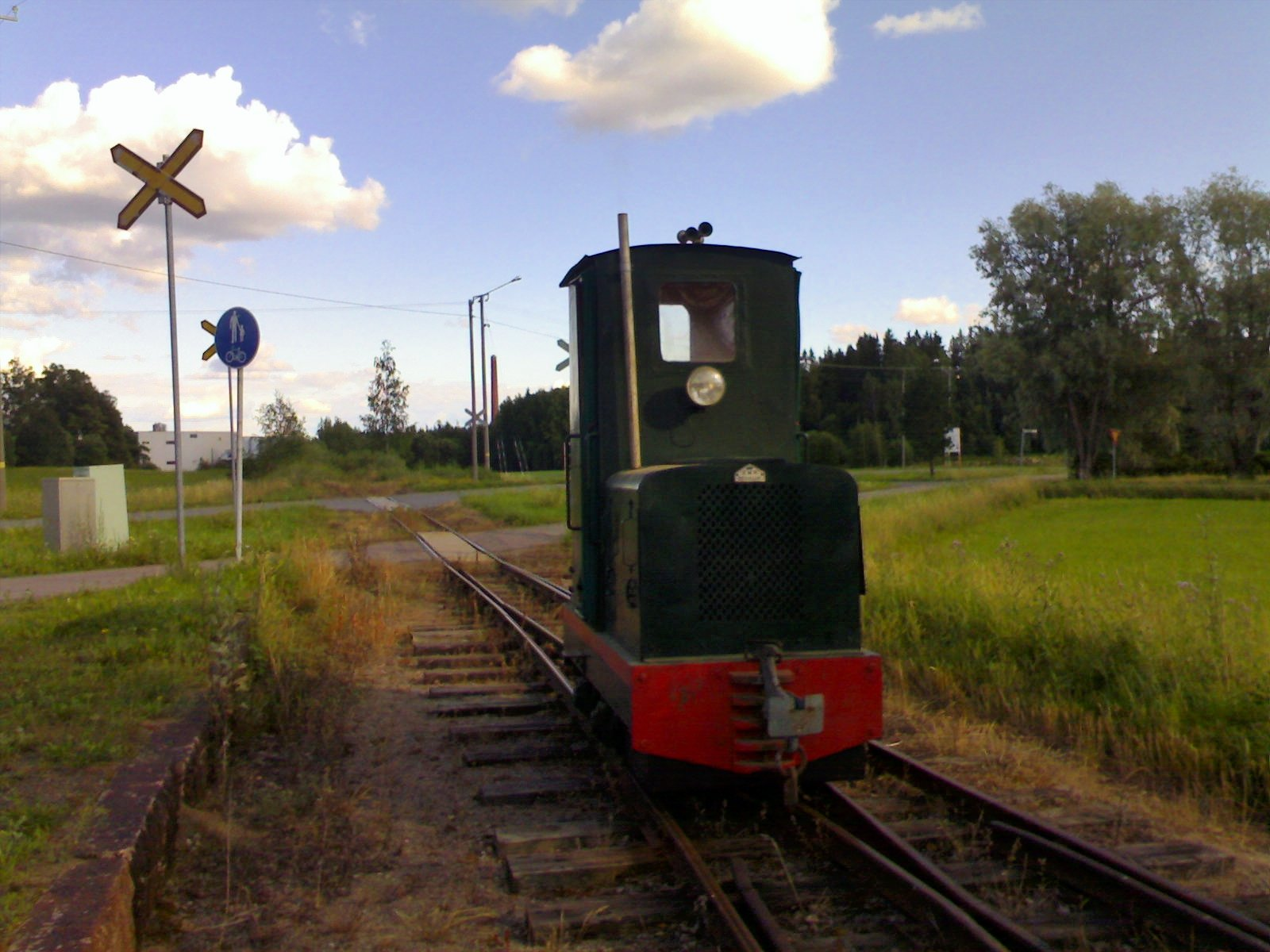 Konnunsuon viimeinen KMN-moottoriveturi Jokioisten asemalla